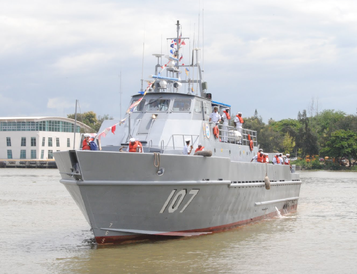 FOTO DEL GUARDACOSTAS DE LA MARINA DE GUERRA DOMINICANA CANOPUS GC-107 PARA LA WIKIPEDIA-- PHOTO OF THE COASTGUARD VESSEL CANOPUS CG-107 FOR WIKIPEDIA